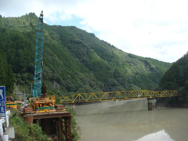 国道193号（195号重複）出合大戸バイパス、出合大橋（仮称）建設現場。奥に見えるのが現道の出合橋